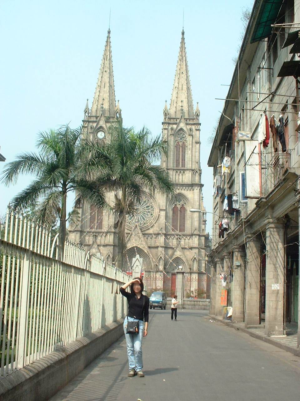 Iglesia del Sagrado Corazón en Guangzhou